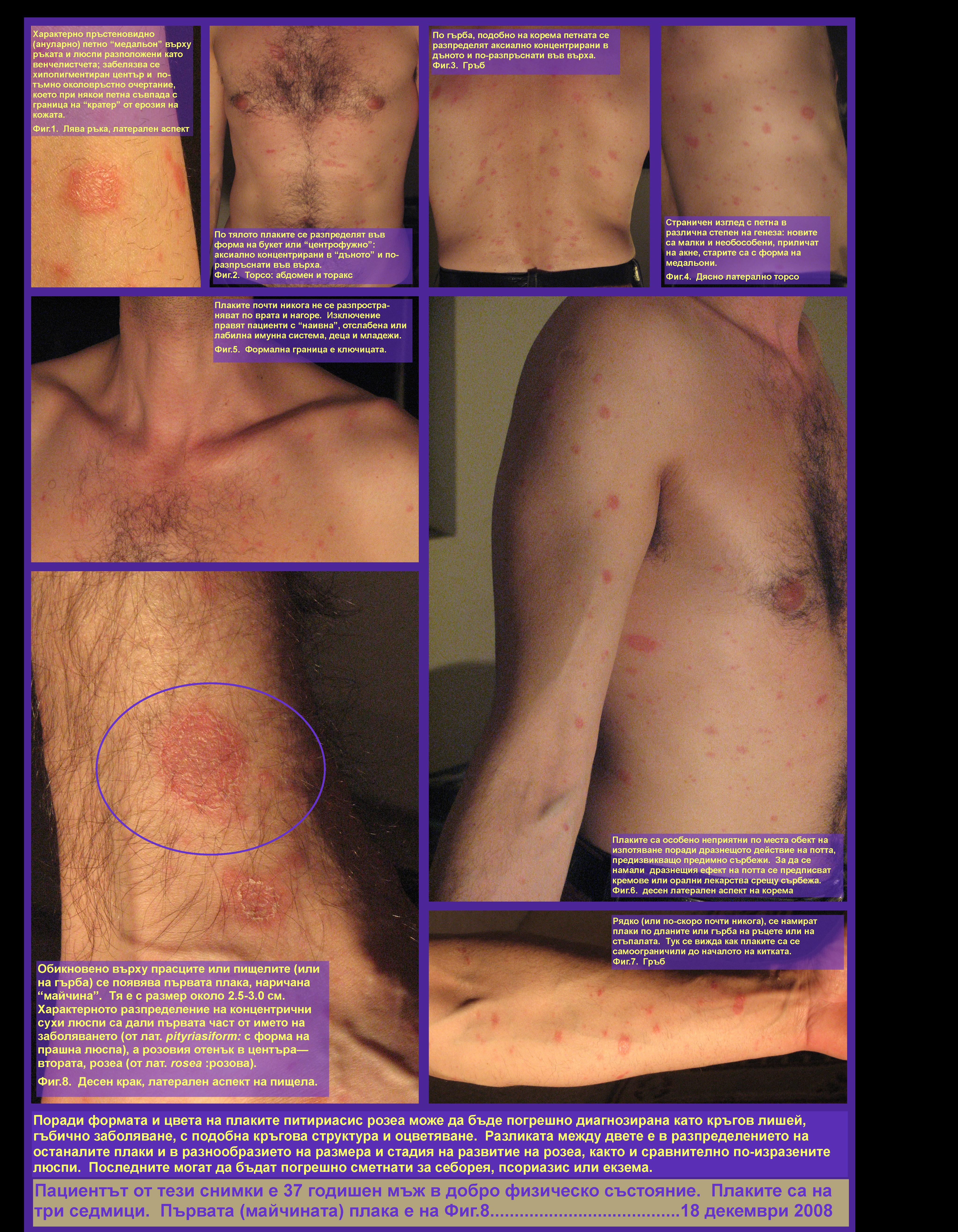 Това цветно табло илюстрира разпространението върху кожата на пациента на плаките на Питириазис розеа. Не са показани краката на пациента поради силно окосмяване и лошо качество на илюстрацията. „Pityriasis rosea e честа доброкачествена папулосквамозна дерматоза, описана за първи път от Camilli Melchior Gibert през 1860 год. Pityriasis обозначава дребно залющване, а rosea се превежда като розово оцветяване. Pityriasis rosea може да има няколко варианта. Не са изолирани бактерии, вируси или гъби като причинители на заболяването.” (Каваклиева, С. Д-р.; Ред. Цанков, Н. Проф.., дмн, 2008)